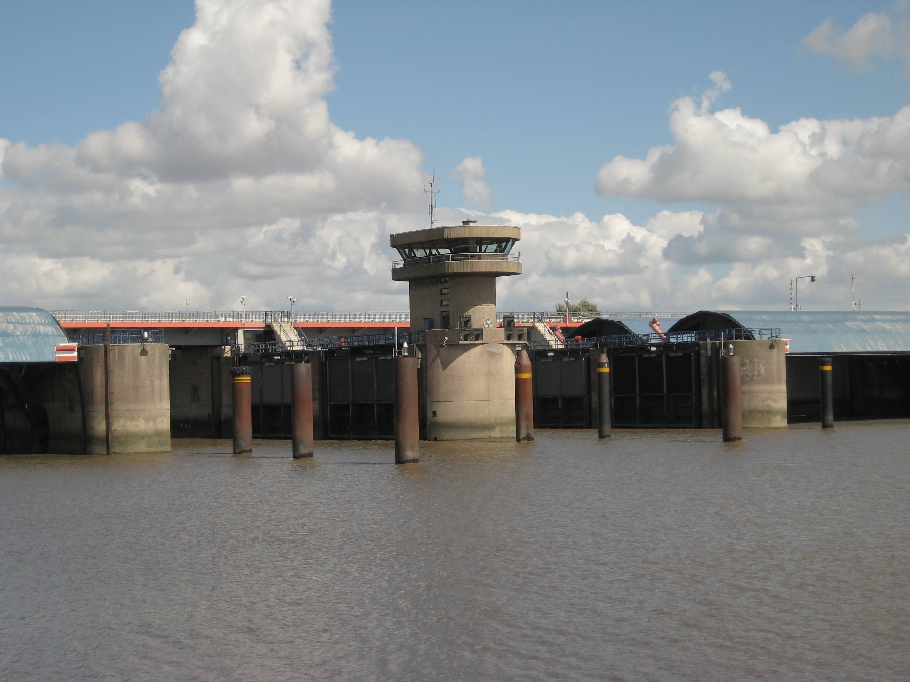 Sperrwerk der Stoer, Germany